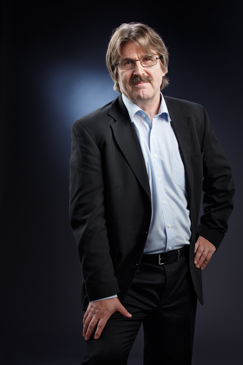 Kuvaus 25.09.2015 Studio P.S.V, Oulu (Reijo Koirikivi)